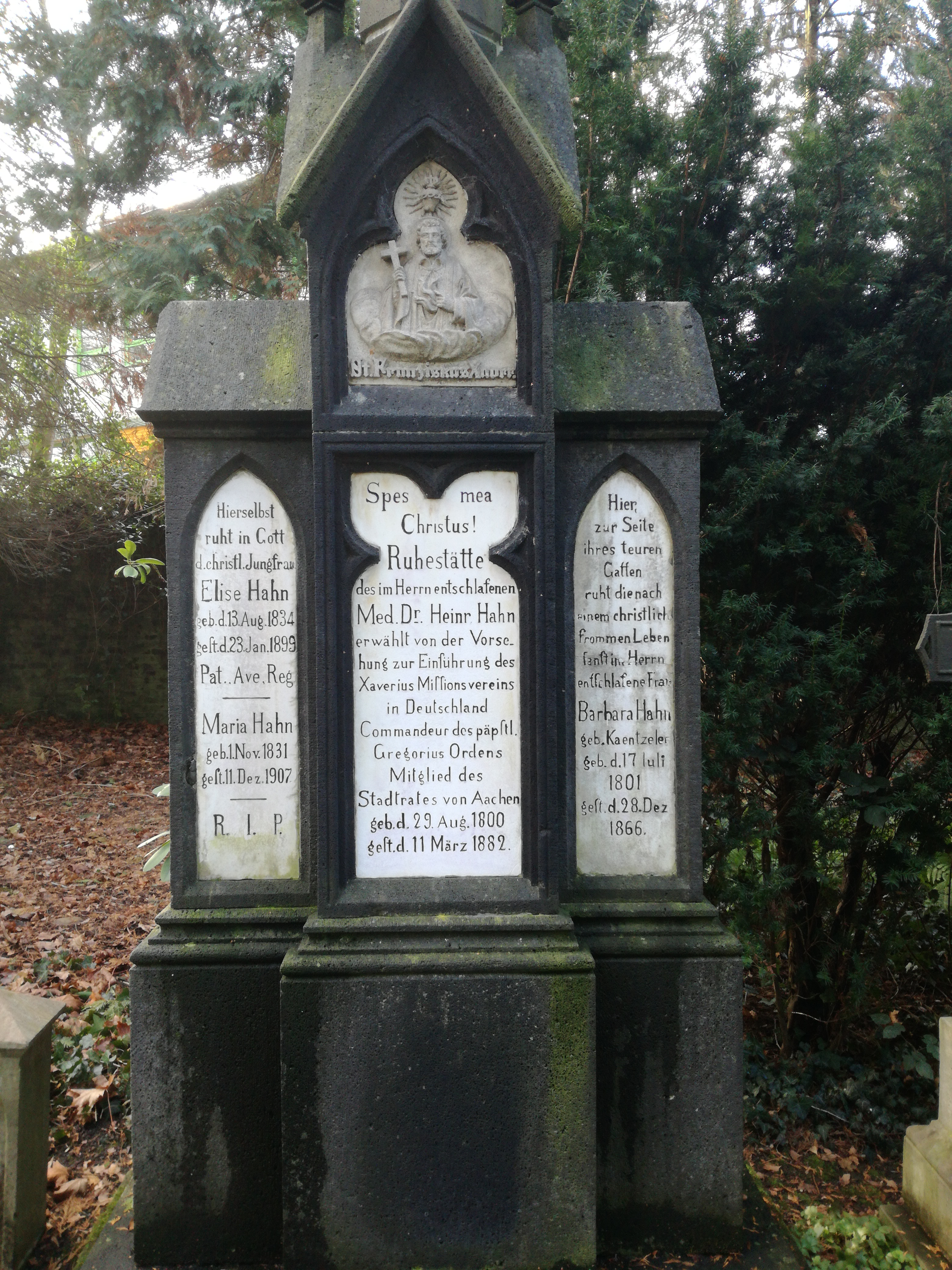 Familiengrab Heinrich Hahn, Ostfriedhof Aachen